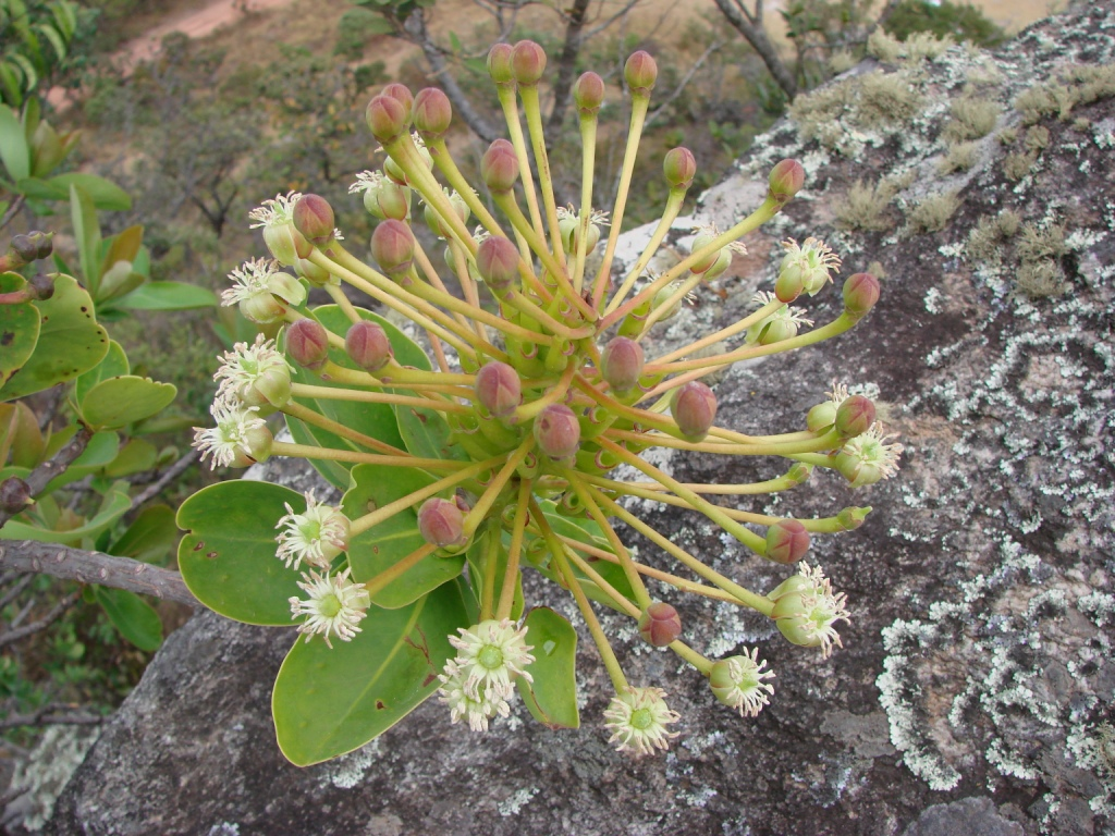 Schwartzia adamantium, Marcgraviaceae - Brasilien/Brasil: Goiás, Parque Estadual Serra dos Pirineus